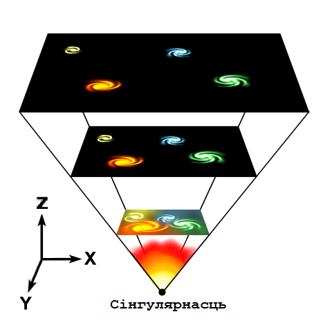 Entstehung des Universums beim Urknall